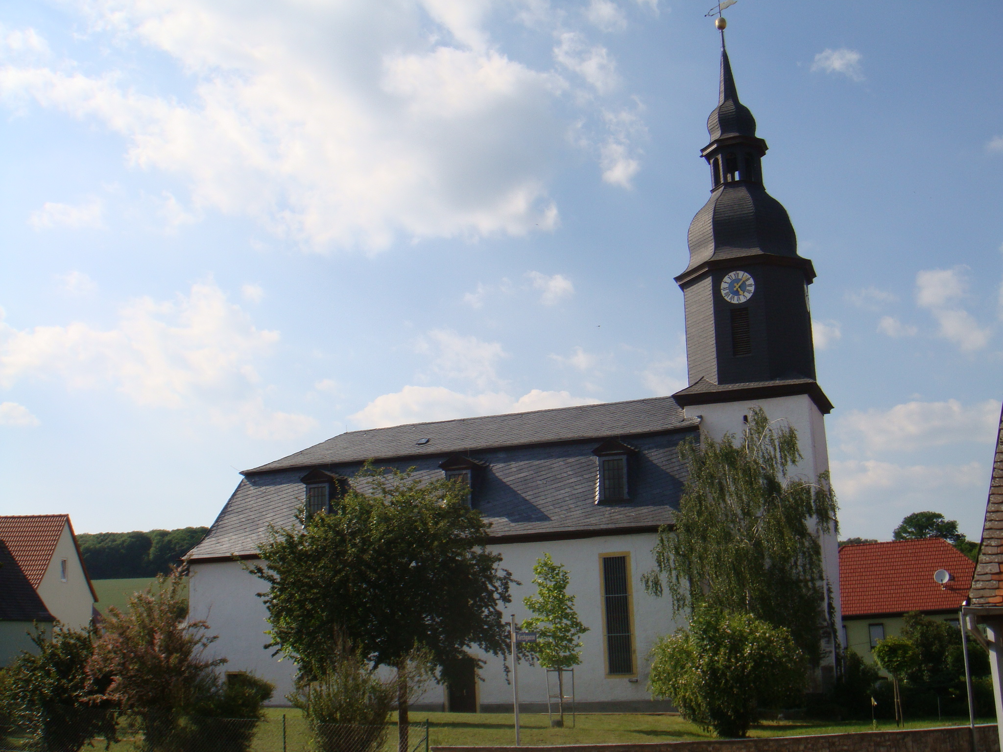 Pfiffelbach Dorfkirche, 2010